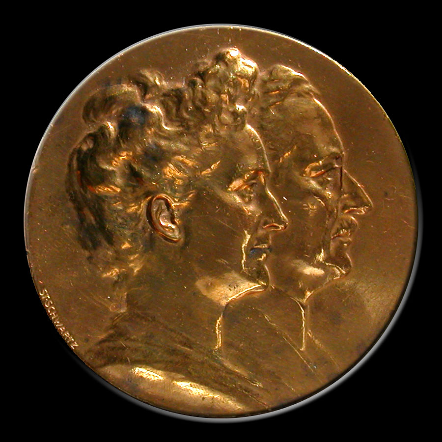 Zur Erinnerung an die silberne Hochzeit von Arthur und Magret Krupp; in dankbarer Verehrung; die Beamten, Meister und Arbeiter der Berndorfer Metallwaaren Fabrik; 17.08.1906.